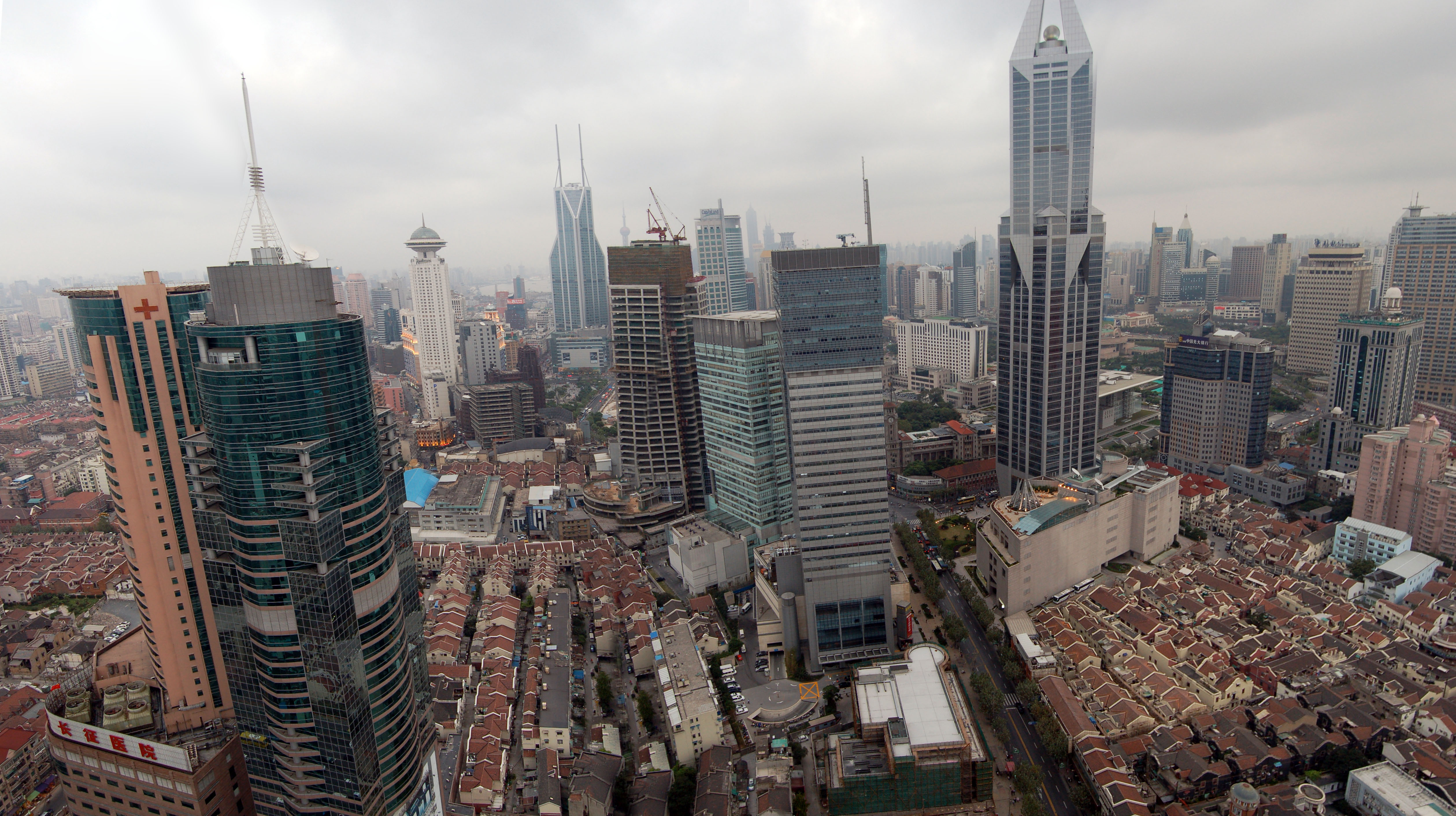 Shanghai :zh:从46层高楼拍摄的上海浦西全景